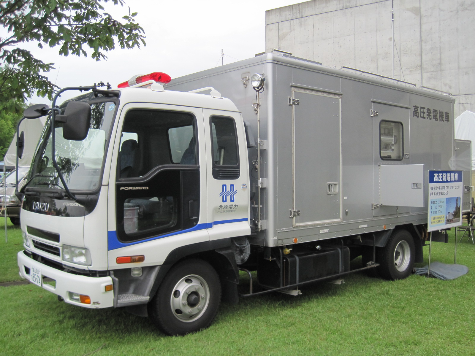 北陸電力の移動電源車（高圧発電機車、いすゞ・フォワード）